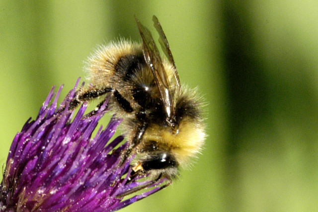 Bombus jonellus from Commanster, Belgian High Ardennes .